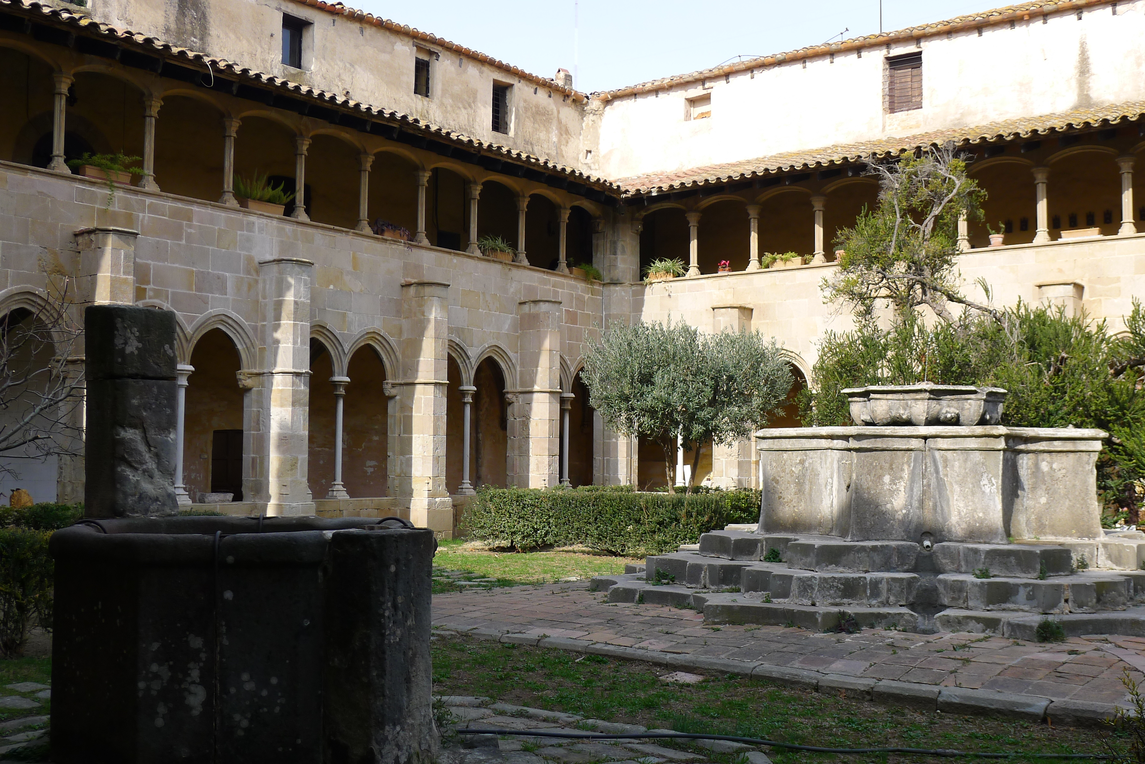 Monasterio de Sant Jeroni de la Murtra - Badalona